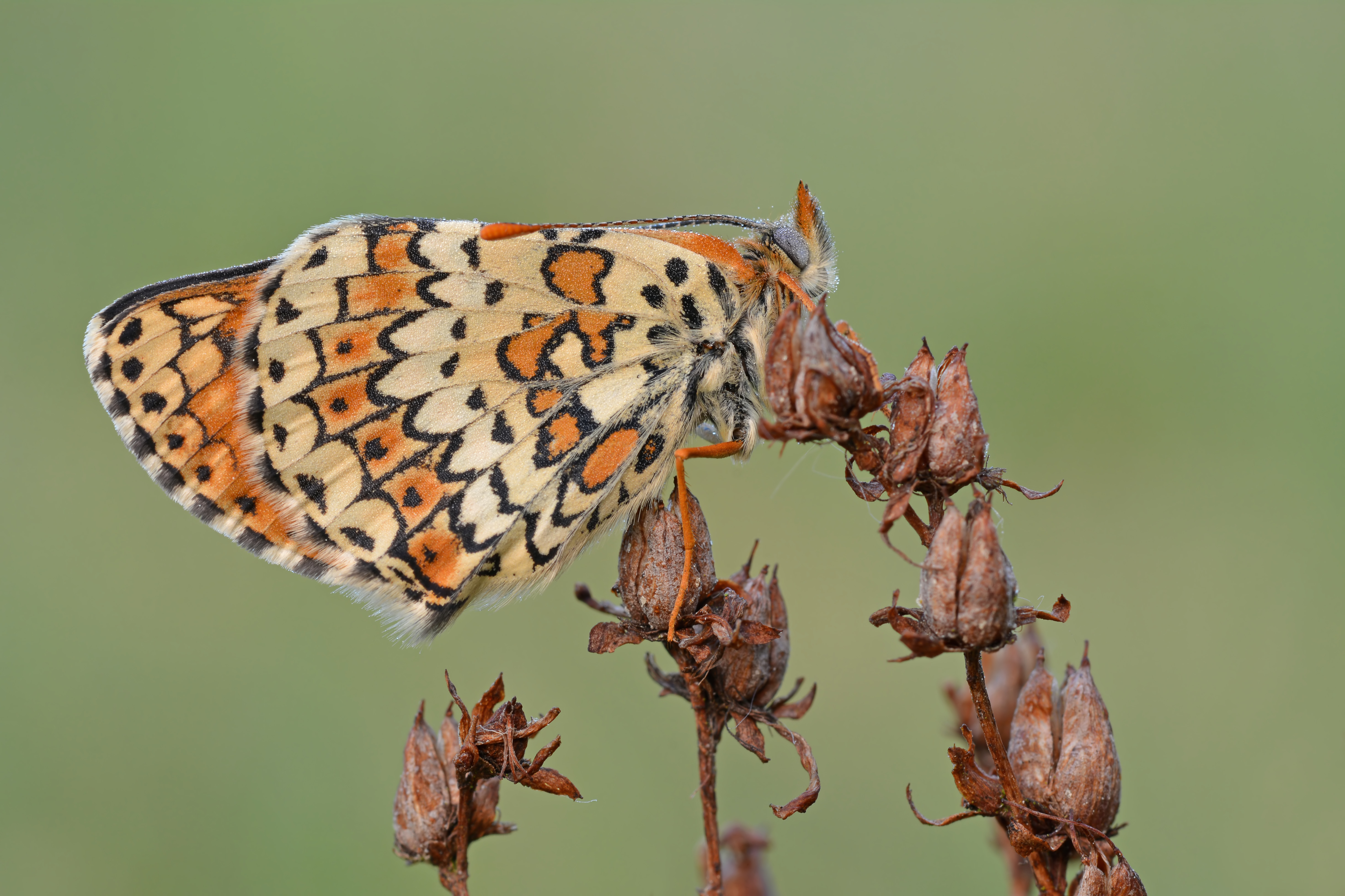 Wegerich-Scheckenfalter (Melitaea cinxia) auf einer kleinen Wiese nahe dem Elbdeich bei Rühstädt um 6:00 Uhr fotografiert; Naturschutzgebiet „Wittenberge-Rühstädter Elbniederung“